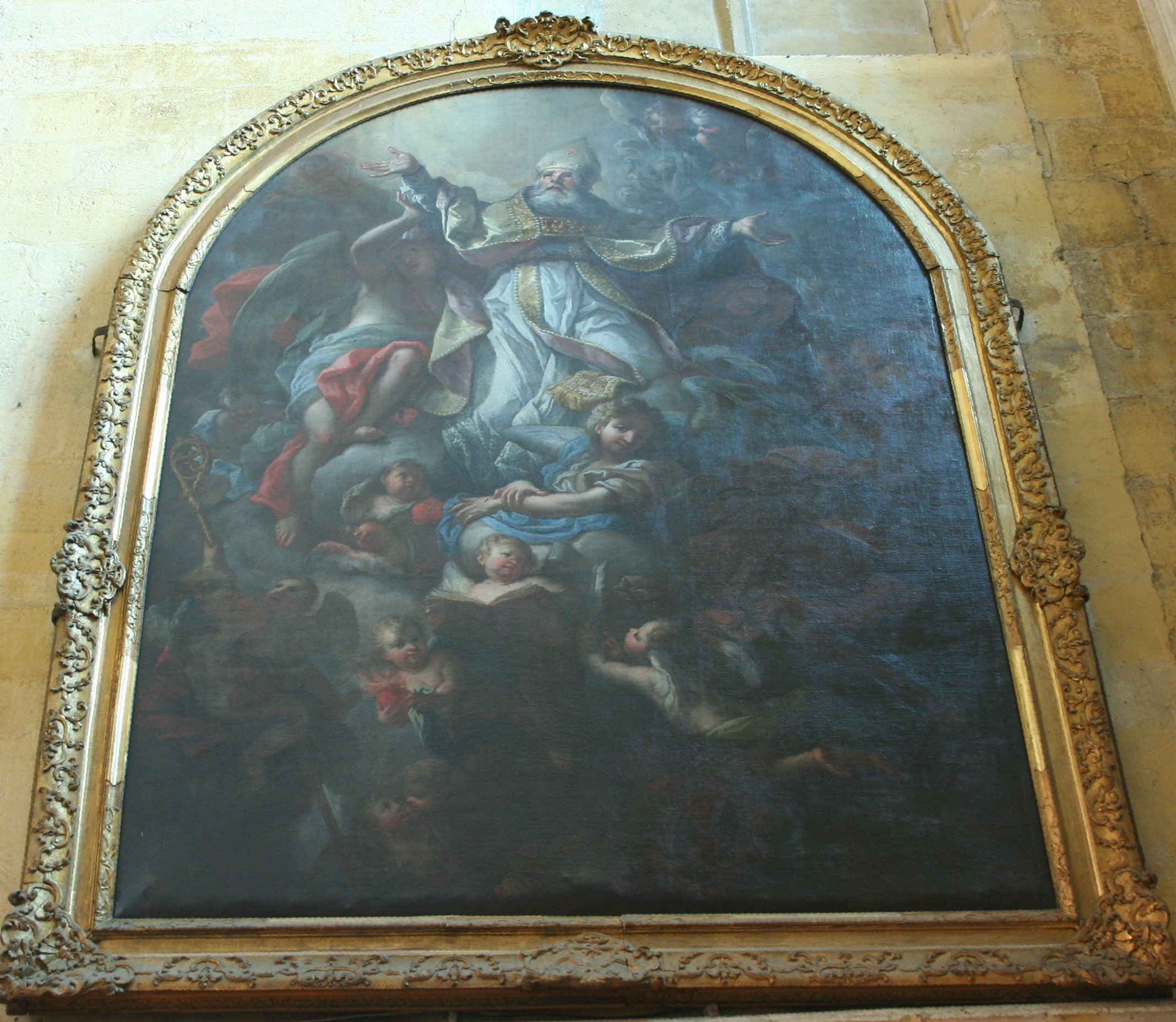 Tableau de Michel Serre se trouvant dans l'église de Saint-Jean-de-Malte à Aix-en-Provence, représentant l'apothéose de Saint-Augustin.